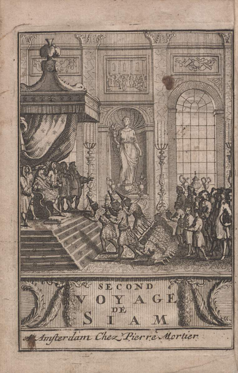 Antiporta